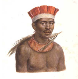 Михайлов Павел Николаевич - Жители острова Великого Князя Александра Николаевича